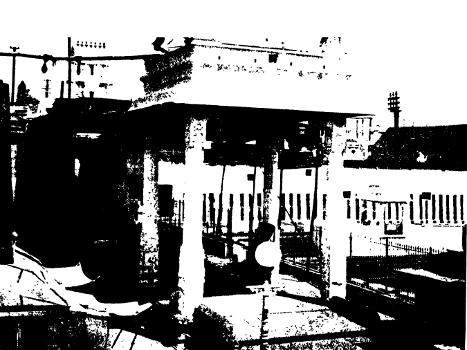 Chennakesava Perumal Temple, Chennai